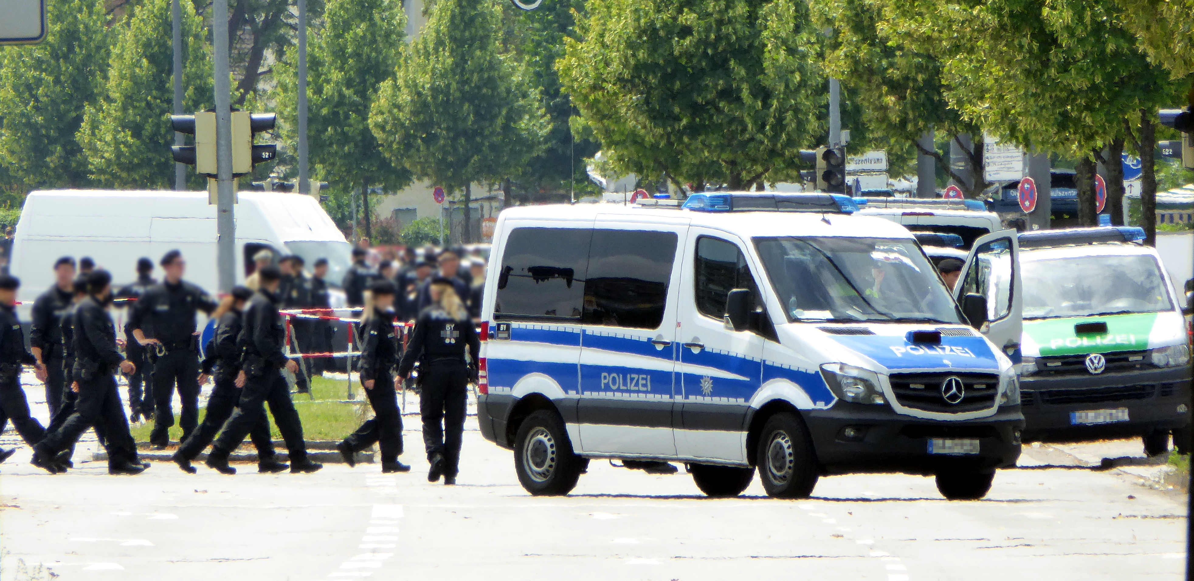 Am Tag nach dem Amoklauf vom 2016-07-22 in München ist der Bereich um das Olympia-Einkaufszentrum wegen polizeilicher Ermittlungen abgesperrt.